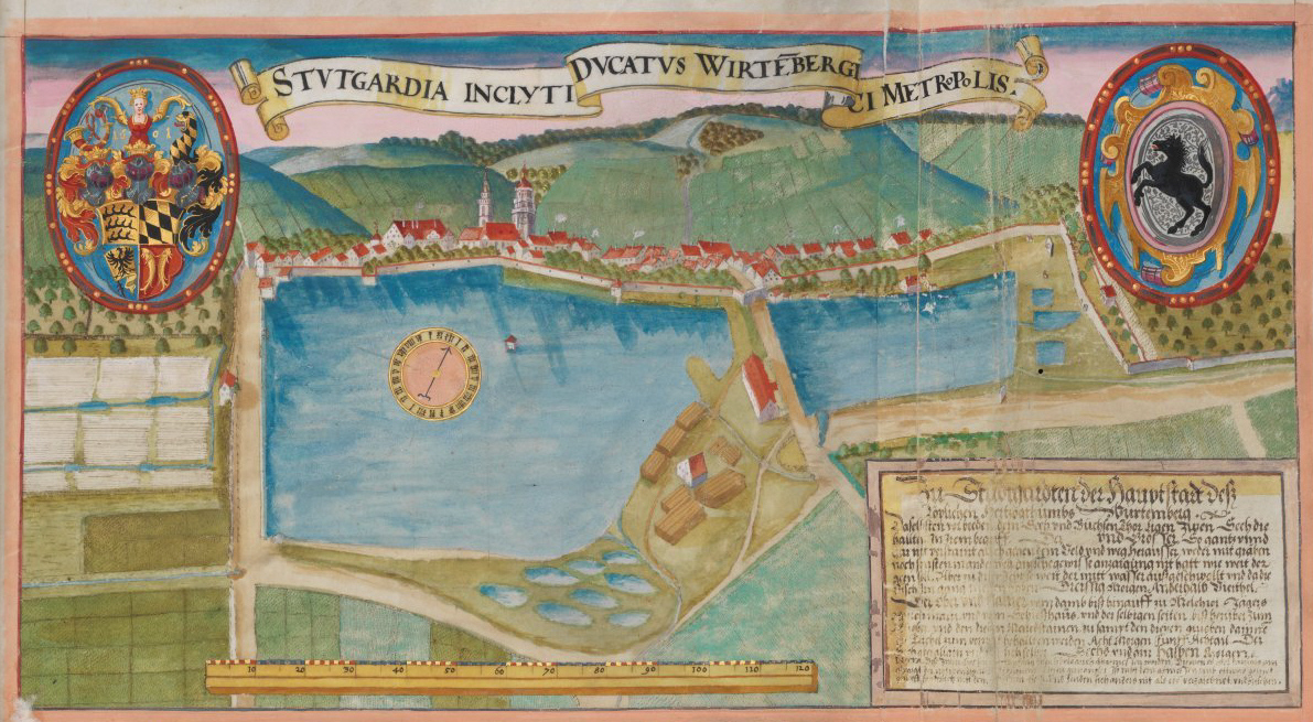 Seehbuch, darinnen alle Seeh und Weyher in dem löplichen Hertzogthumb Würtemberg. Stuttgart (?), Anfang 17. Jh.; Württembergische Landesbibliothek Stuttgart, Cod. hist. fol. 261, fol. 2r, Detail: Stuttgart